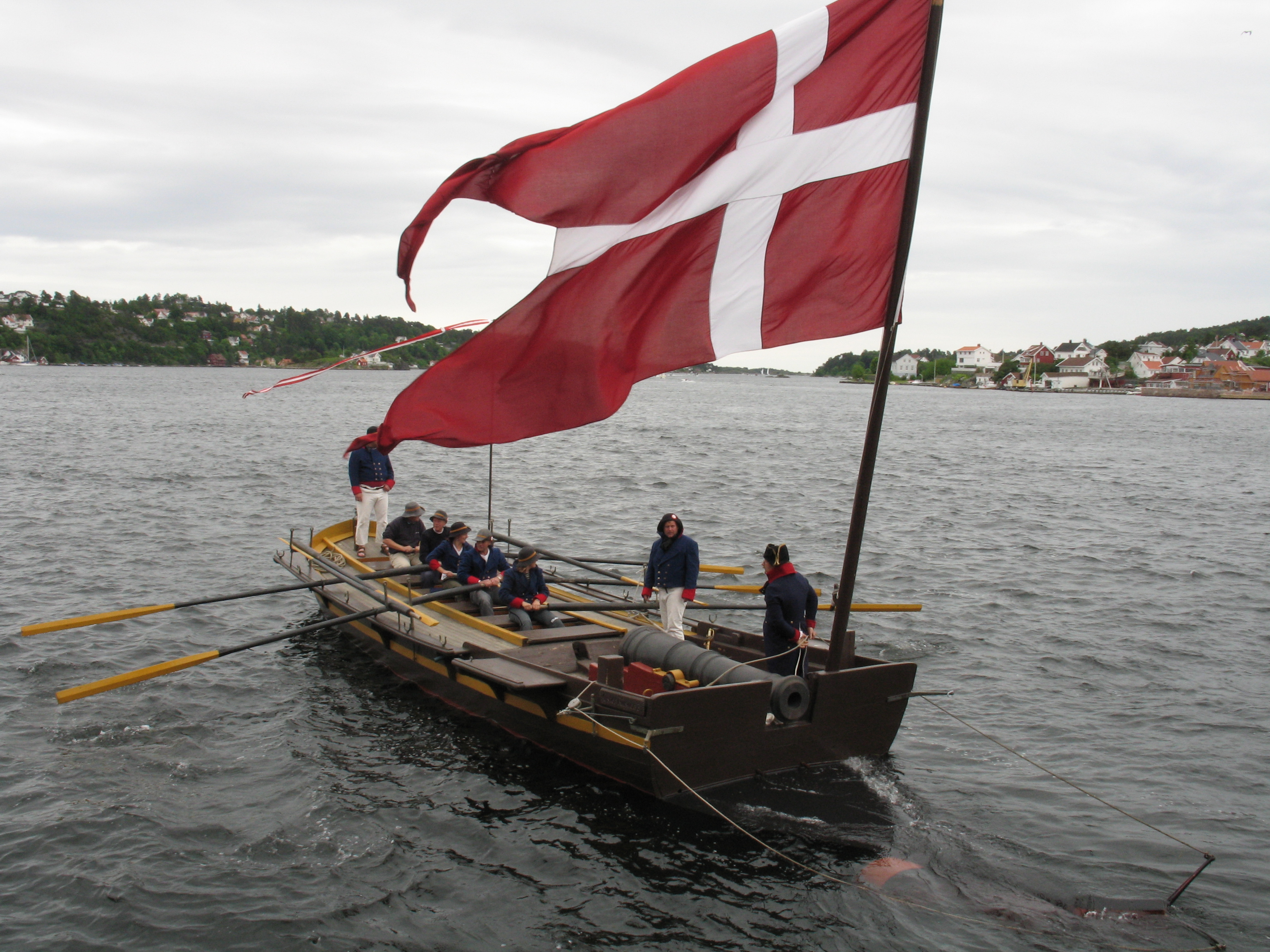 Kanonjolle Øster Riisøer 3, en nøyaktig kopi av kanonjoller som ble brukt under Napoleonskrigene, bygd etter originale tegninger. Øster Riisøer I og II ble bygd i 1807. Øster Riisøer III er hjemmehørende i Risør, og er her fotografert i år 2005 på Arendal havn, under festivalen Kjempestaden. I 1807 var Danmark og Norge en stat som ofte kalles Danmark-Norge.